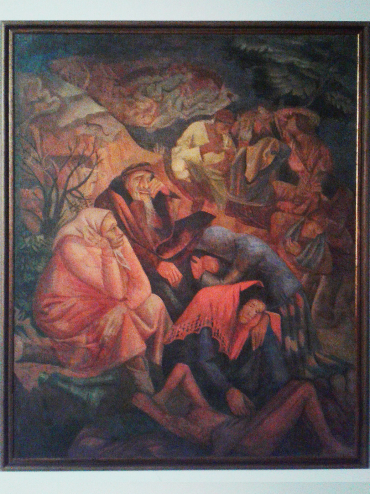 Шехтман Мануїл Йосипович. «Єврейський погром», 1926. Полотно, темпера. Національний художній музей України